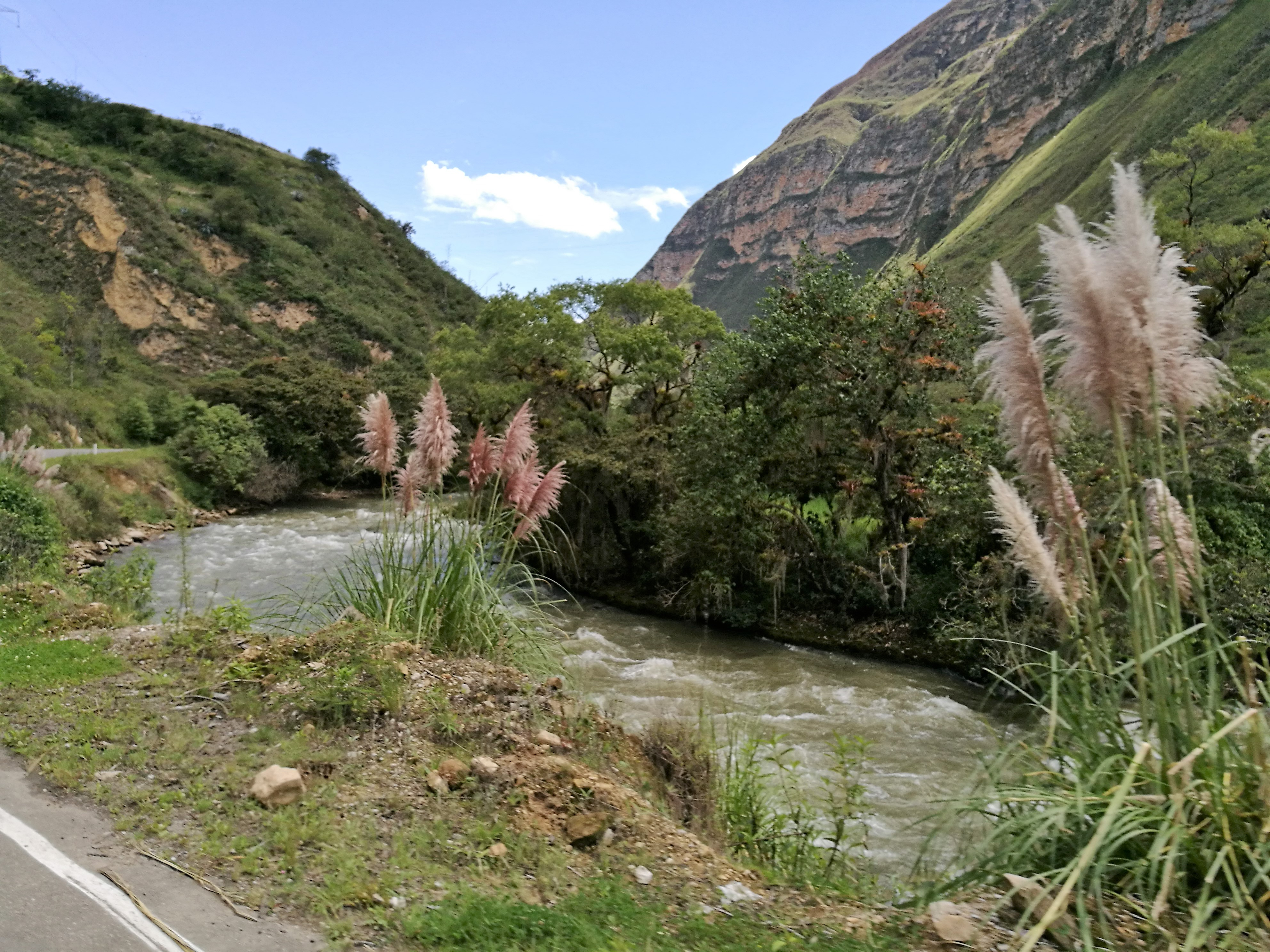 Riu Utcubumba entre Chachapoyas i Leimebamba